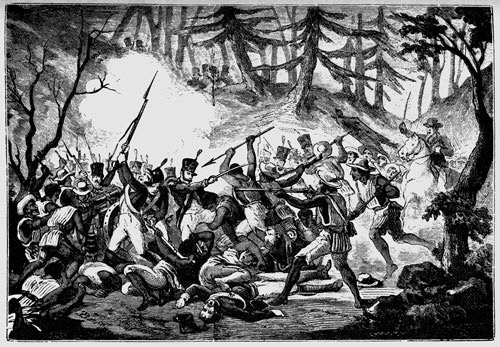 Gravure représentant la bataille du Mont des Croix, guerre d'indépendance du Mexique